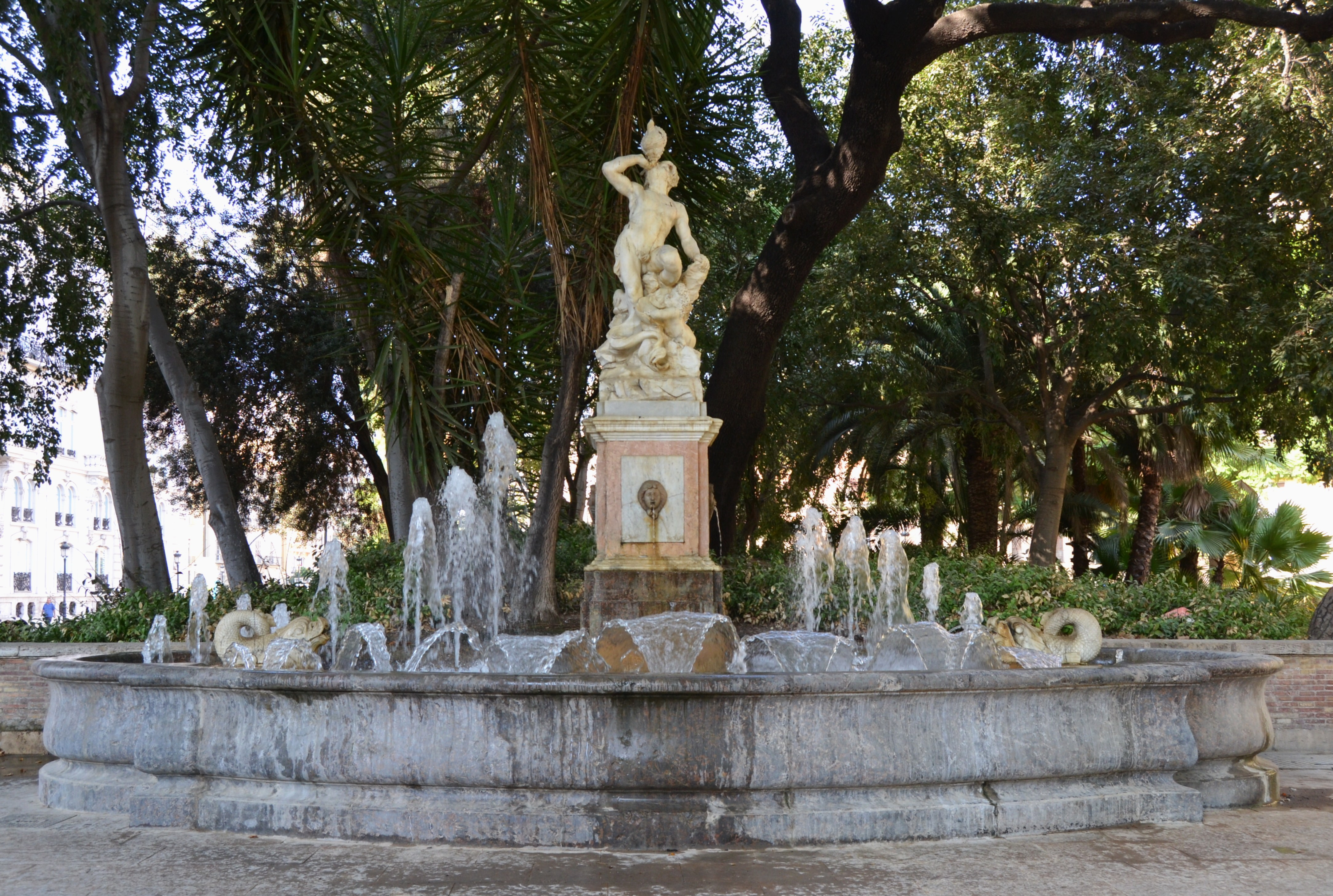 Font del Tritó de la Glorieta de València. Procedeix de l'Hort de Pontons i és obra de l'italià Ponzanelli.